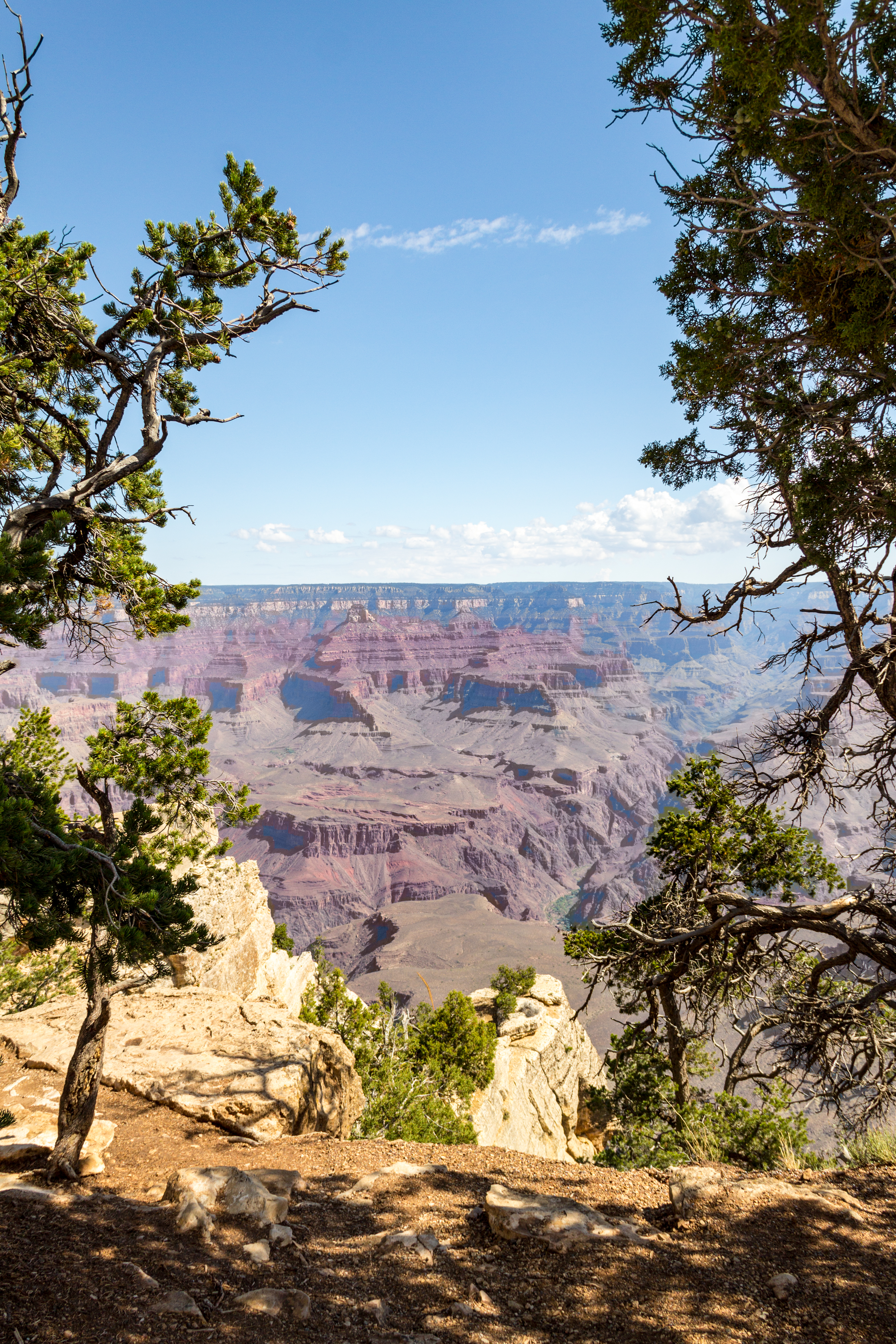 Grand Canyon (Arizona, USA), South Rim nahe Tusayan